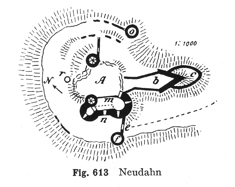 Neudahn, Grundriss